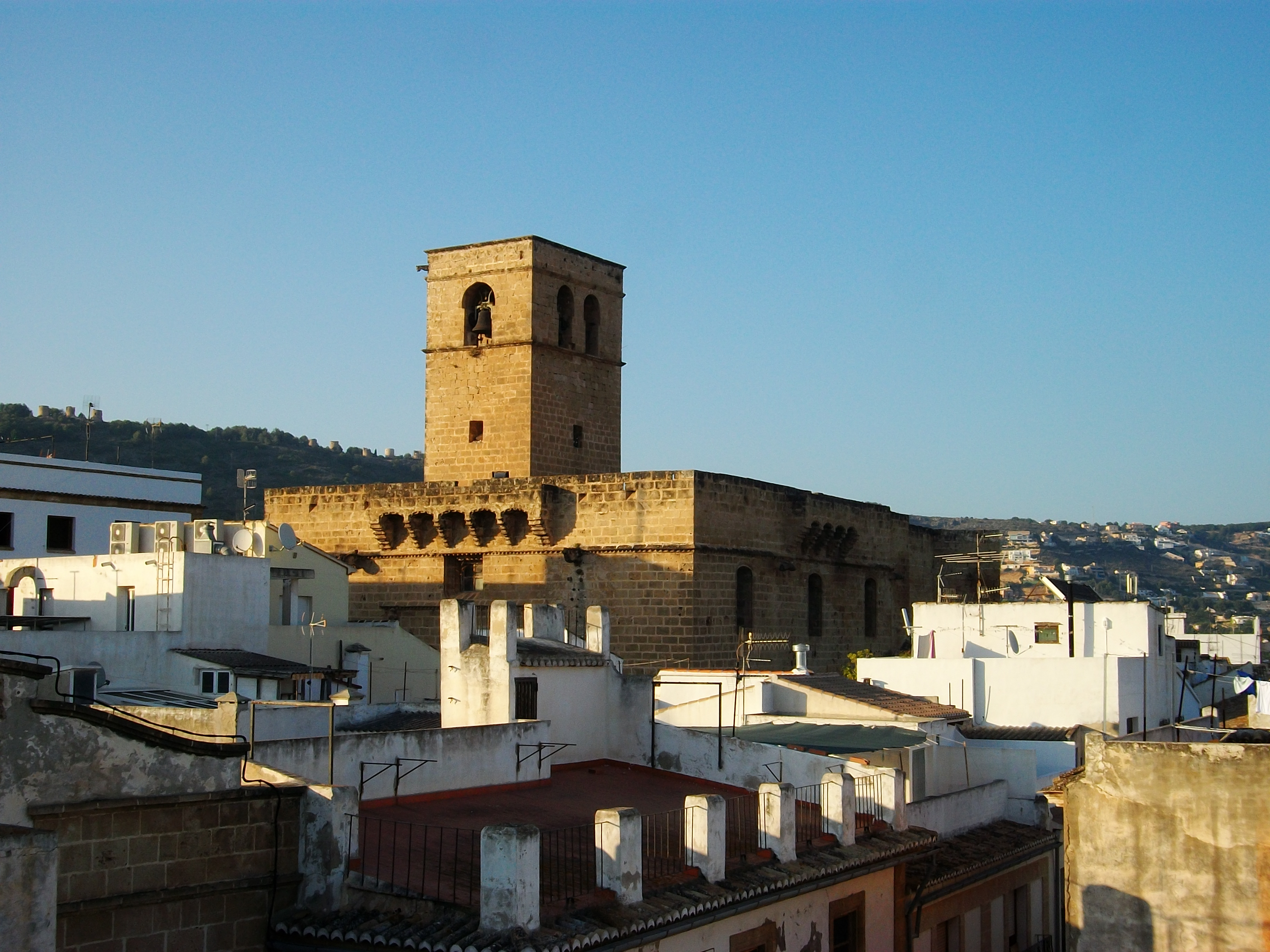 Església de Sant Bartomeu de Xàbia.